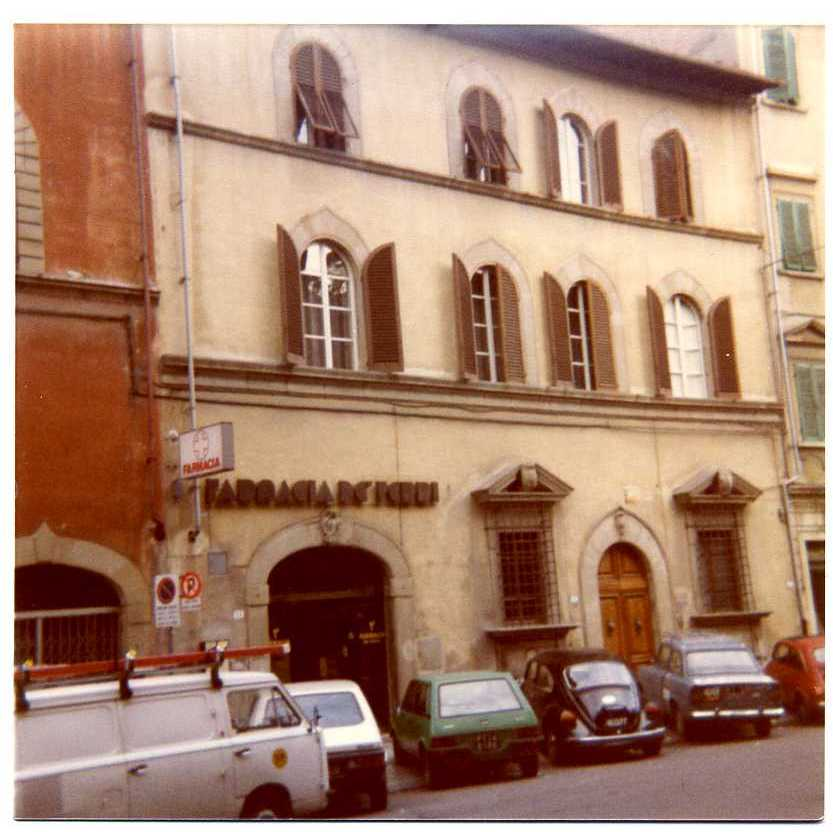 l'autore sono io